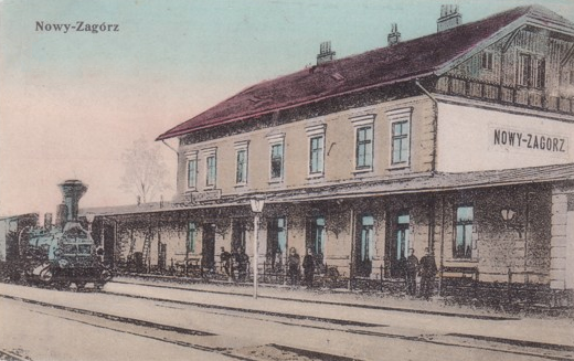 Nowy Zagórz, dworzec kolejowy